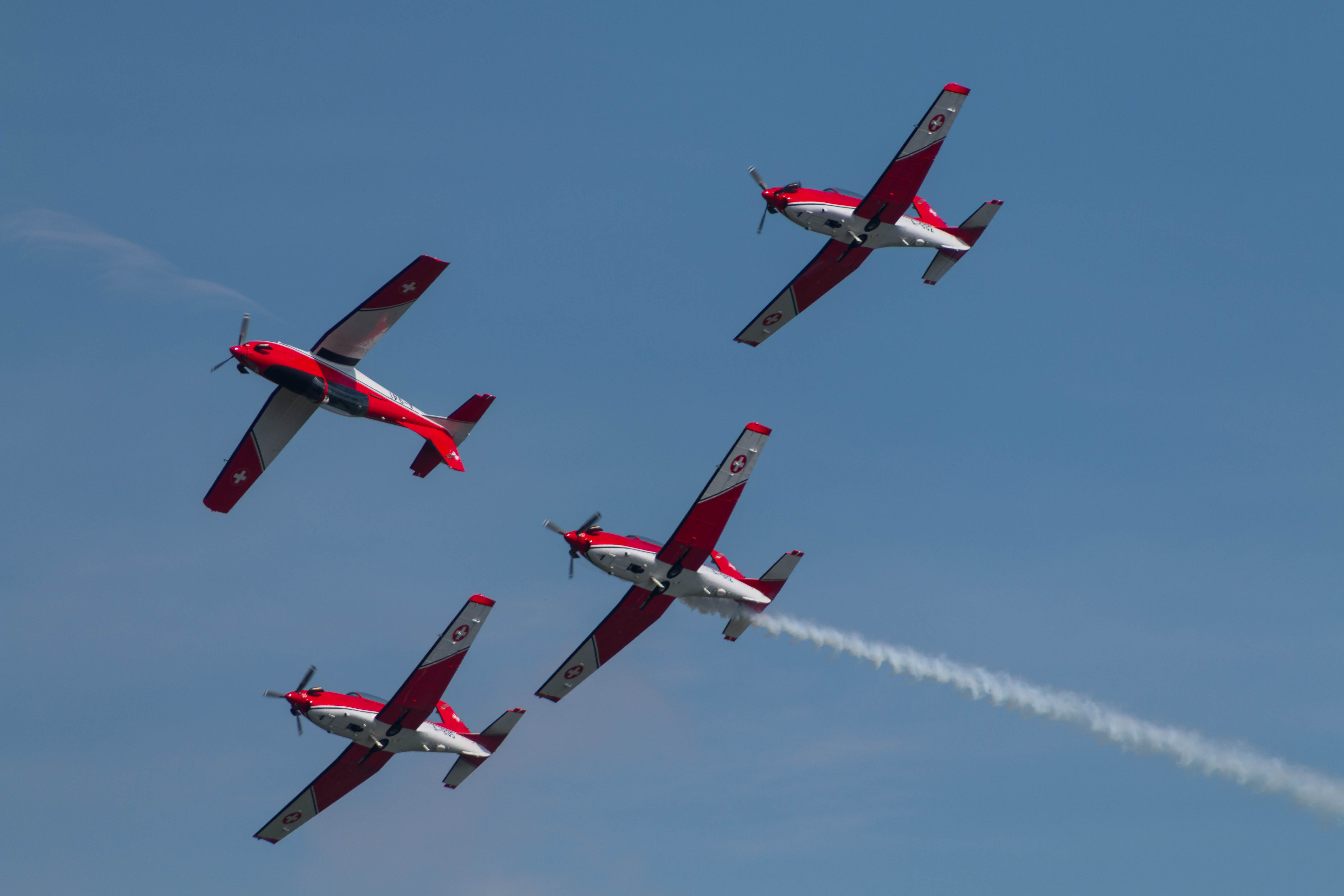 PC-7 Team